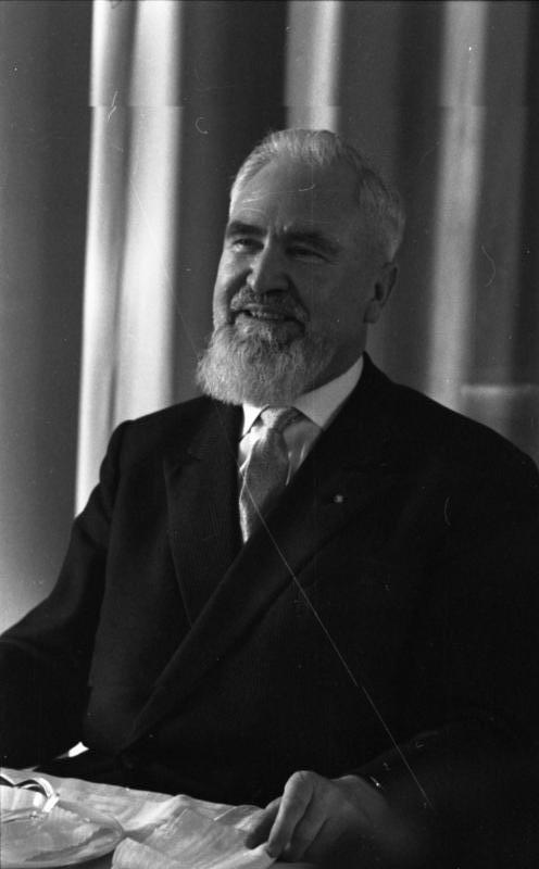 Staatsbesuch Zypern. Vizepräs. Kütchük [Kütschük] Portraits